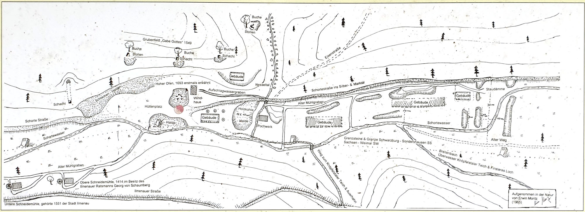 historischer Lageplan des Industriestandortes, aufgenommen u. gezeichnet von 1965 von Erwin Moritz